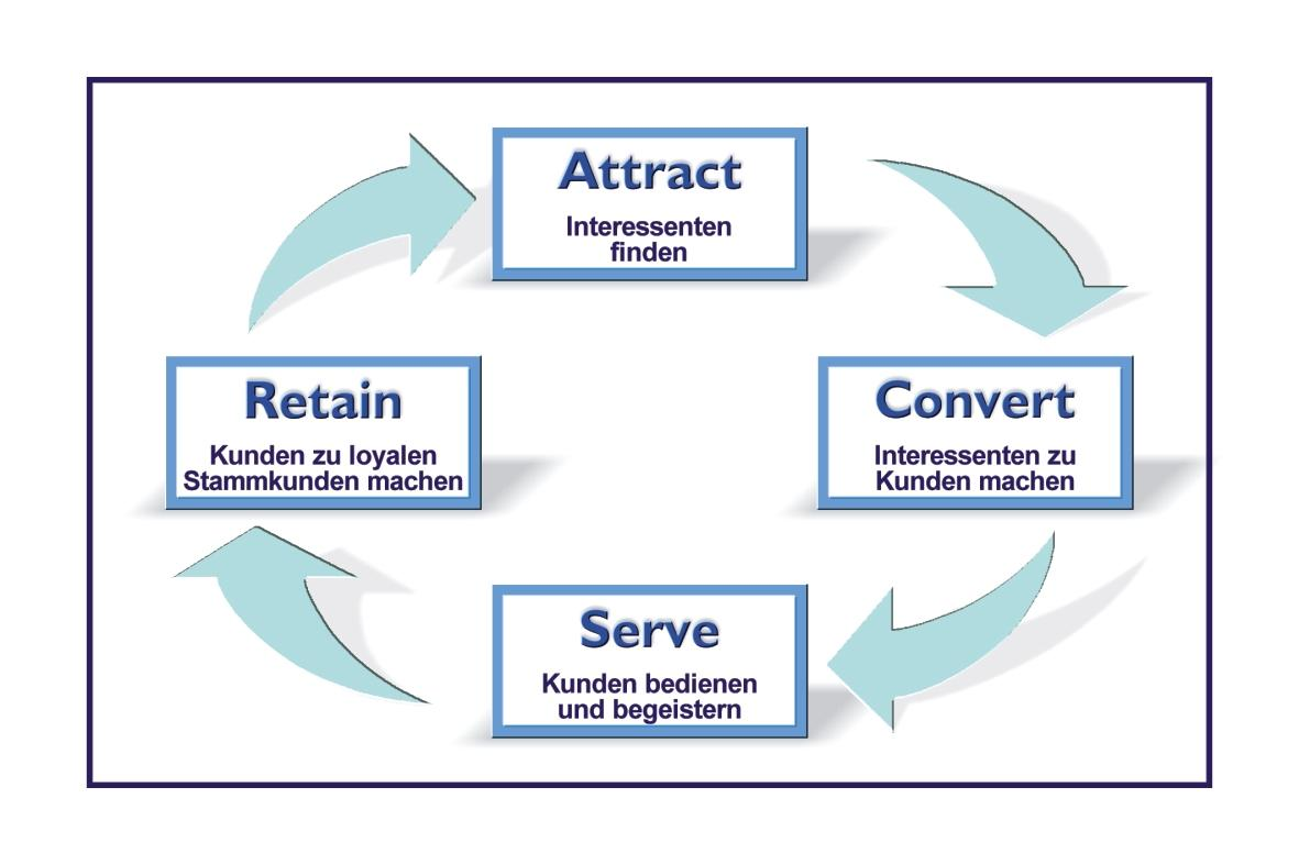 Der Loyalitätskreislauf (Marketing, E-Marketing)